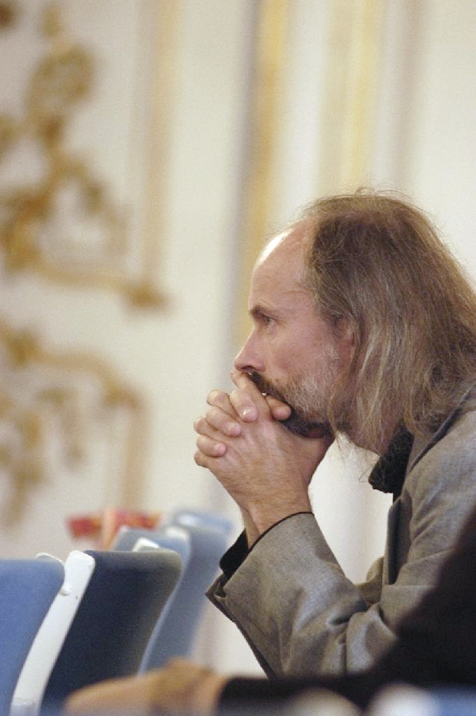 Václav Vaculovič, Kroměříž, Česká republika